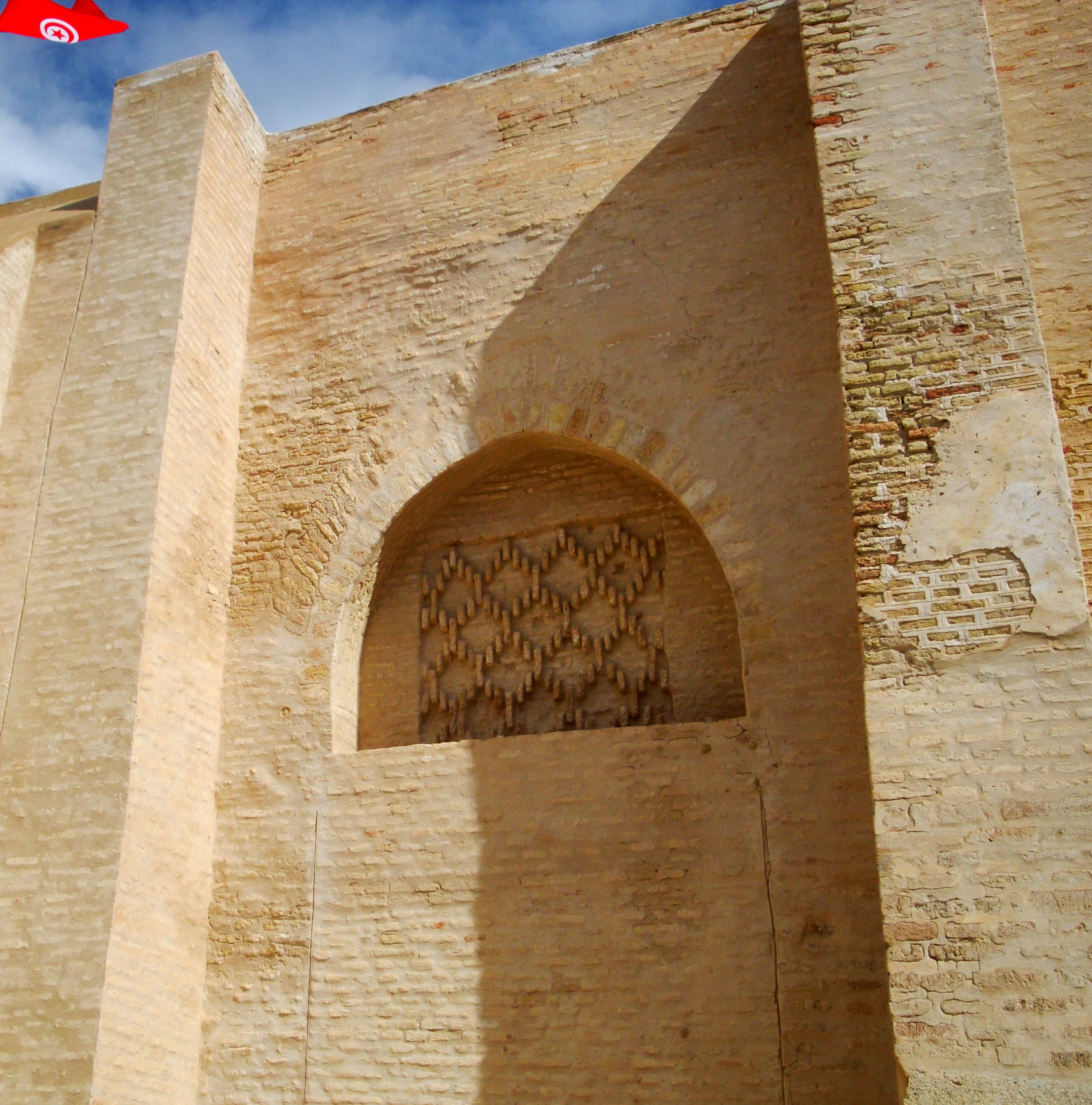 Niche à fond plat ornée d'un décor géométrique sur la façade occidentale de la Grande Mosquée de Kairouan, en Tunisie.